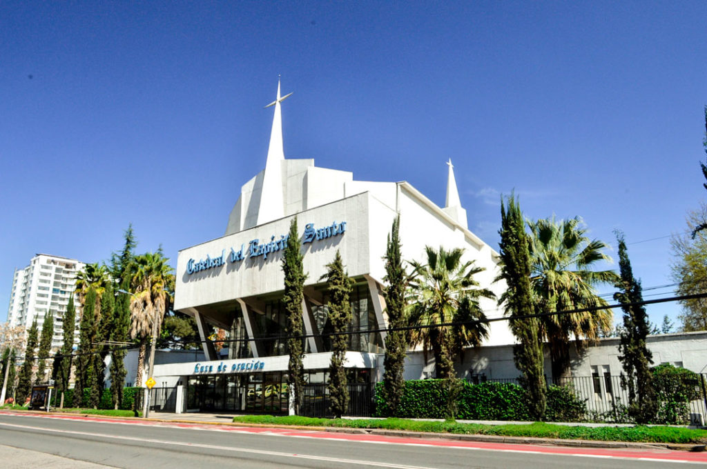 Frontis del Templo Principal